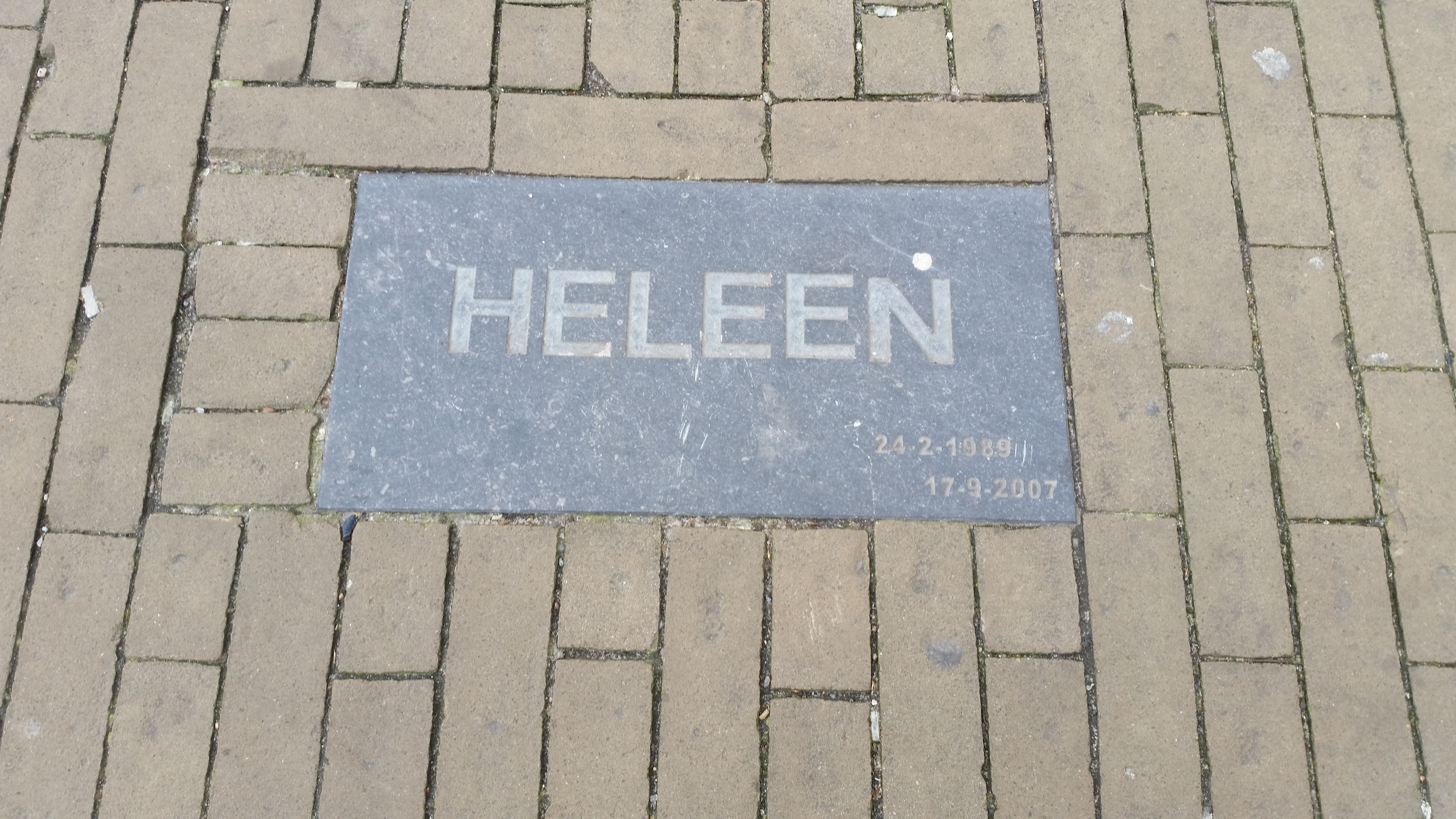 Gedenksteen Heleen Franssen nabij de Freddie Heinekenbrug in het trottoir van de Stadhouderskade